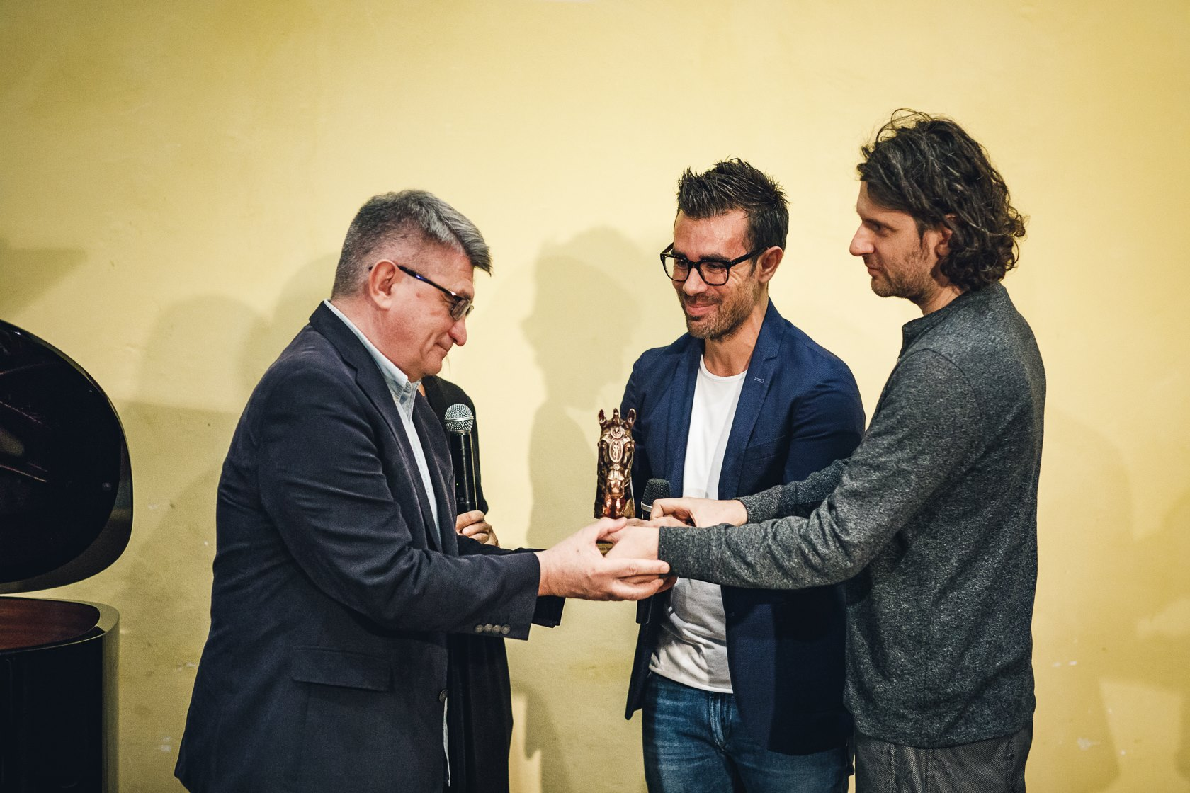 Il regista russo Aleksandr Sokurov riceve il Bronzo Dorato alla carriera 2017 di Animavì dal direttore artistico Simone Massi e dal direttore organizzativo Mattia Priori